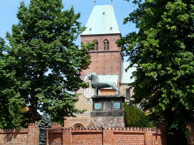 Ratzeburg - Dom (Ratzeburg - cathedral)